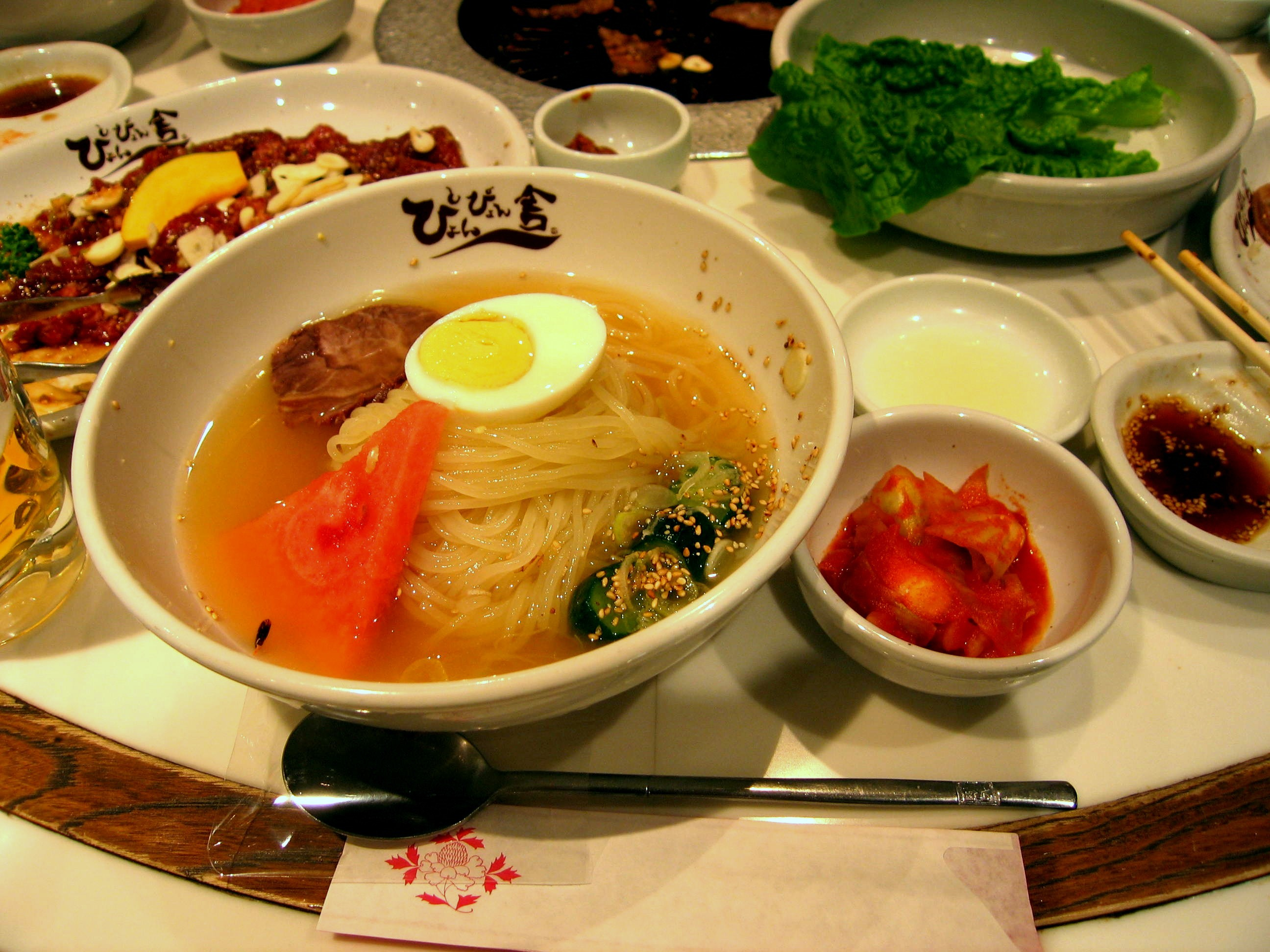 盛岡冷麺、ぴょんぴょん舎盛岡駅前店にて Morioka Reimen Taken on May 3, 2006